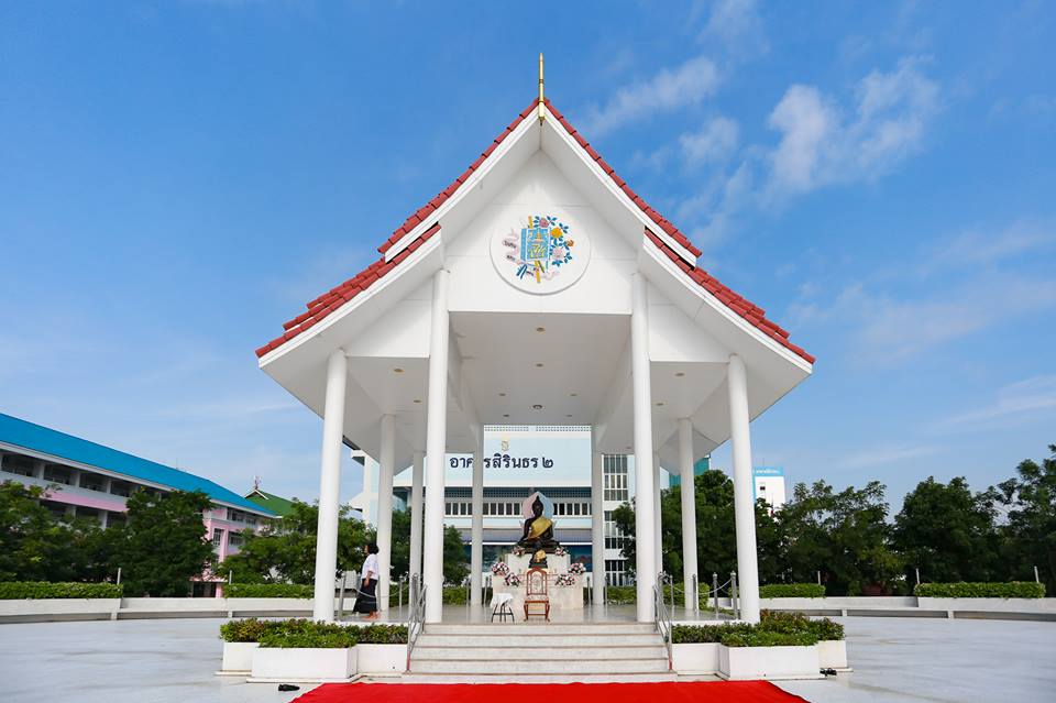 หอพระพุทธรูปหลวงพ่อสวนกุหลาบ โรงเรียนสวนกุหลาบวิทยาลัย รังสิต